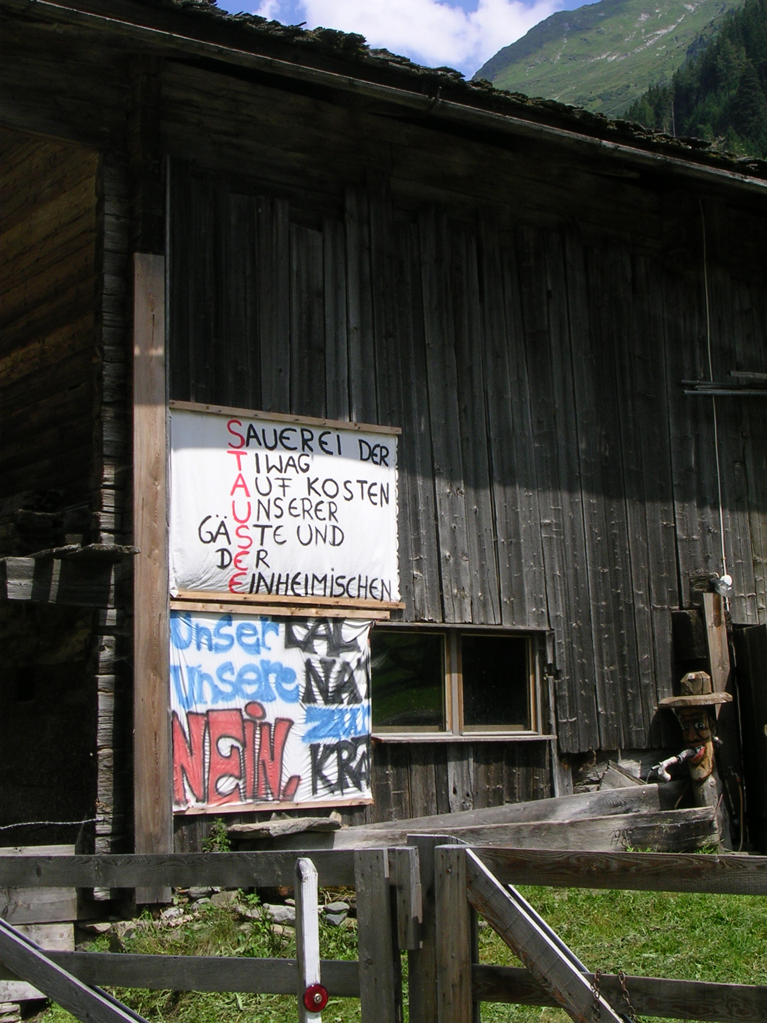 Die Fraktion Raneburg in der Gemeinde Matrei in Osttirol. Im Bild ein Widerstandsplakat gegen das Pumpspeicherkraftwerk Matrei-Raneburg.